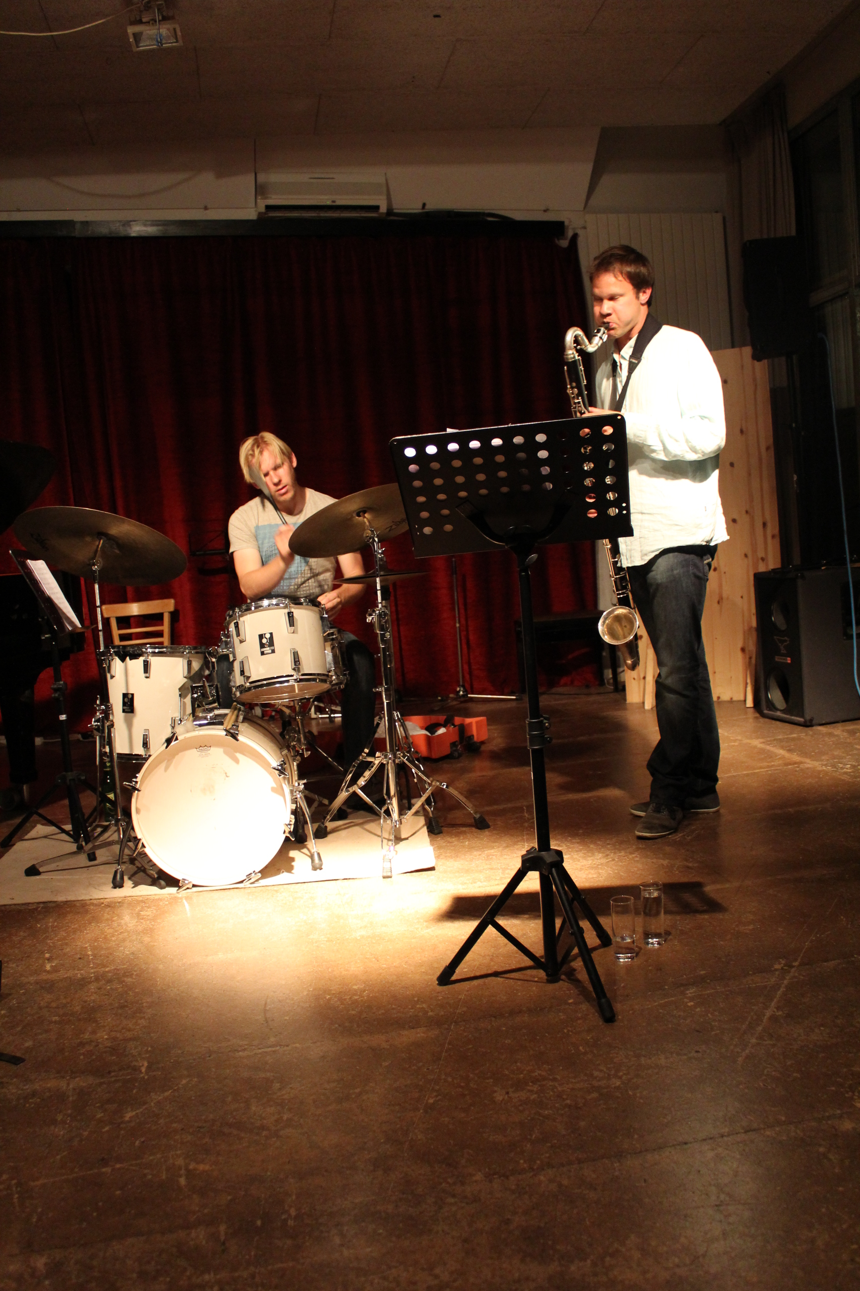 Joris Roelofs bei einem Konzert mit Schlagzeuger Ted Poor (links) und Pablo Held (nicht im Bild) im Kölner Loft, Juli 2012